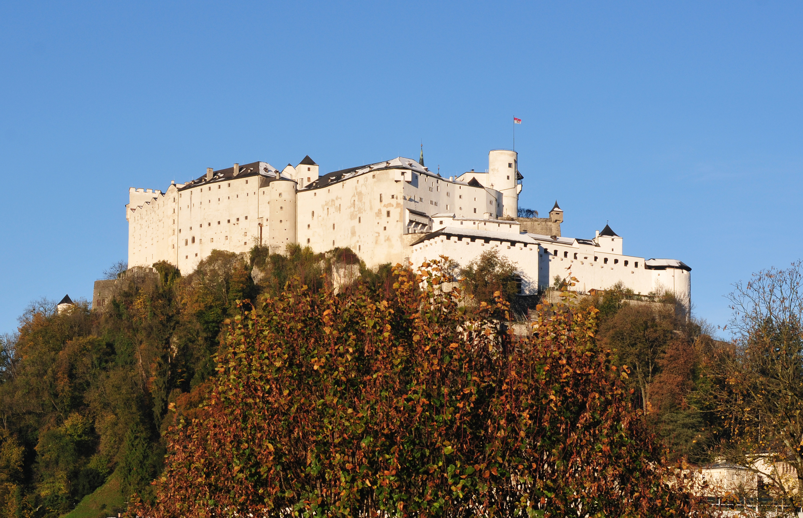 Salzburg